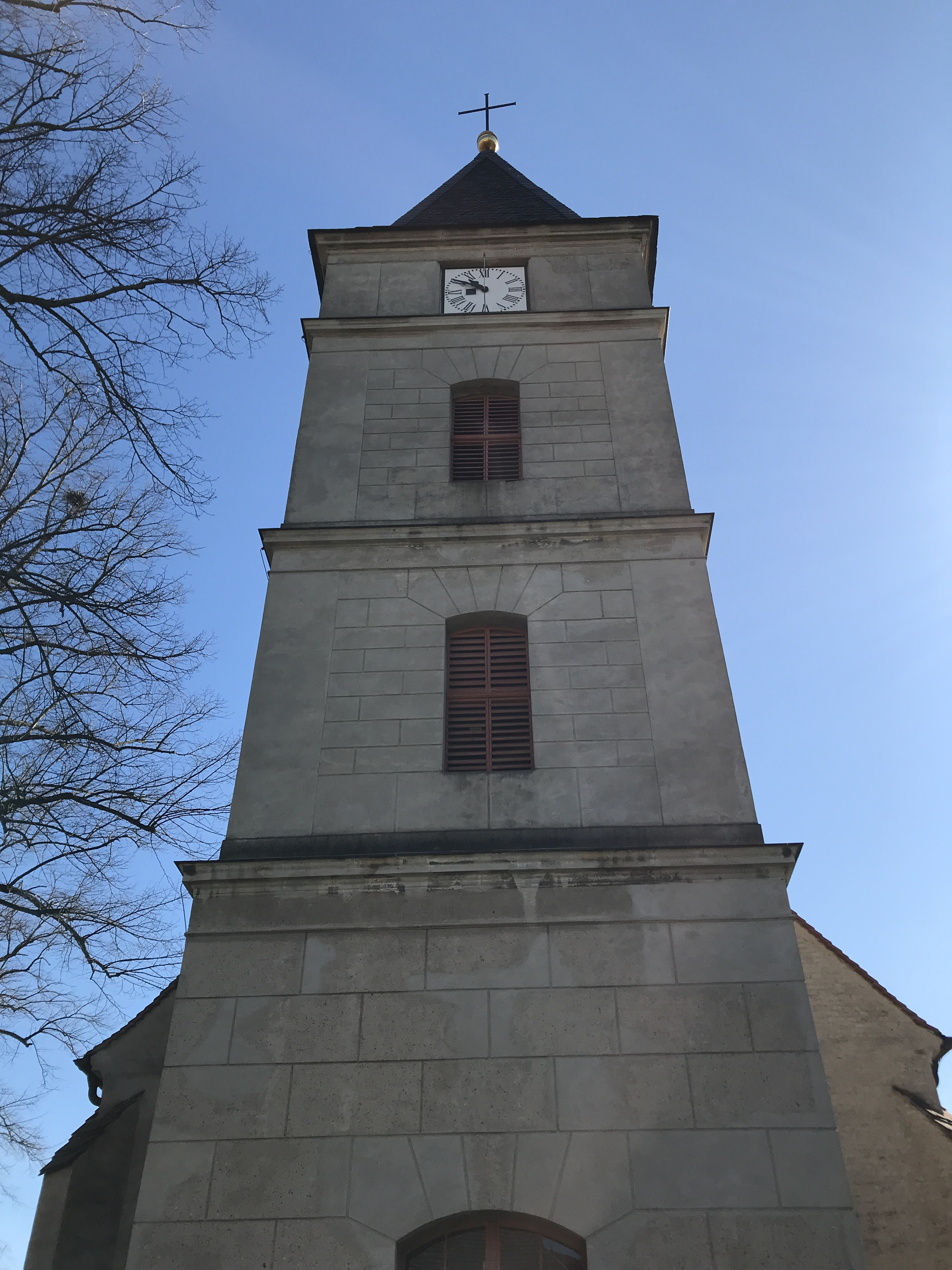 Die Stadtkirche St. Lambertus ist eine im Kern spätgotische Basilika, die nach einem Brand 1776 erneuert wurde. Die Kirchenausstattung stammt einheitlich aus dieser Zeit.